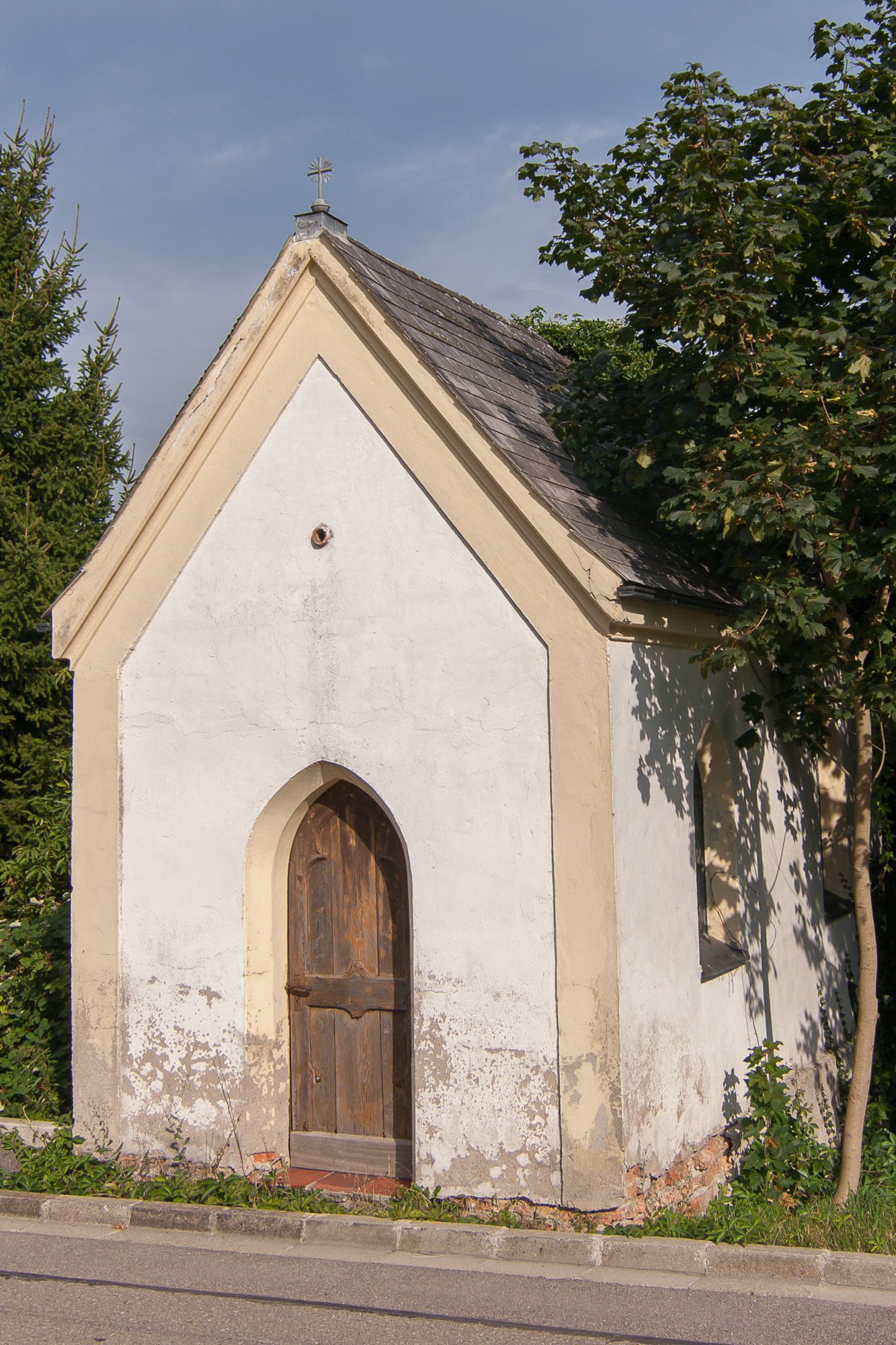 Wegkapelle; 19. JahrhundertThis is a photograph of an architectural monument.